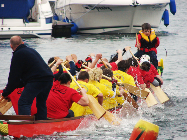 Dracheboot_MueritzSail